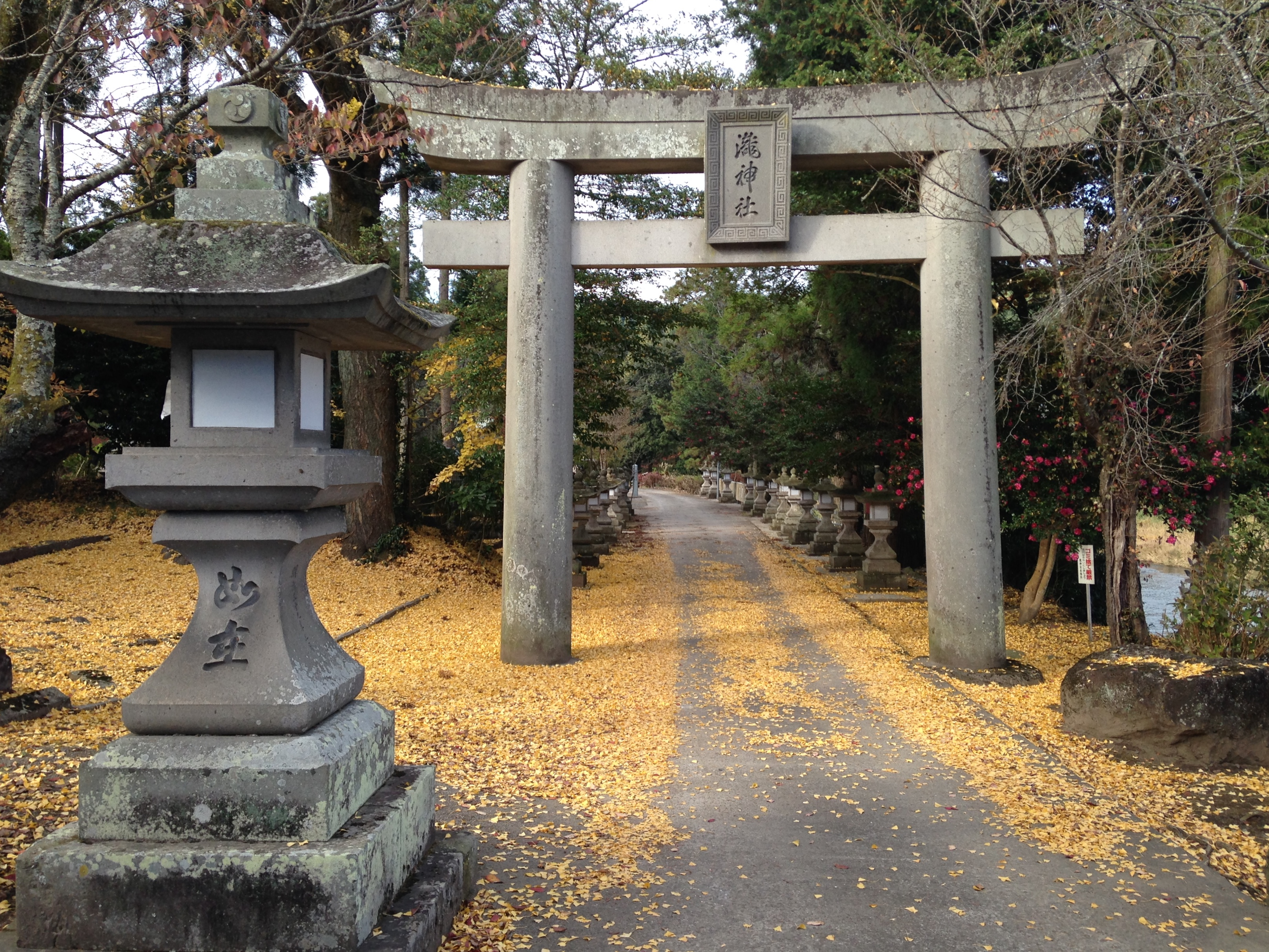 嵐山瀧神社・一の鳥居と常夜灯